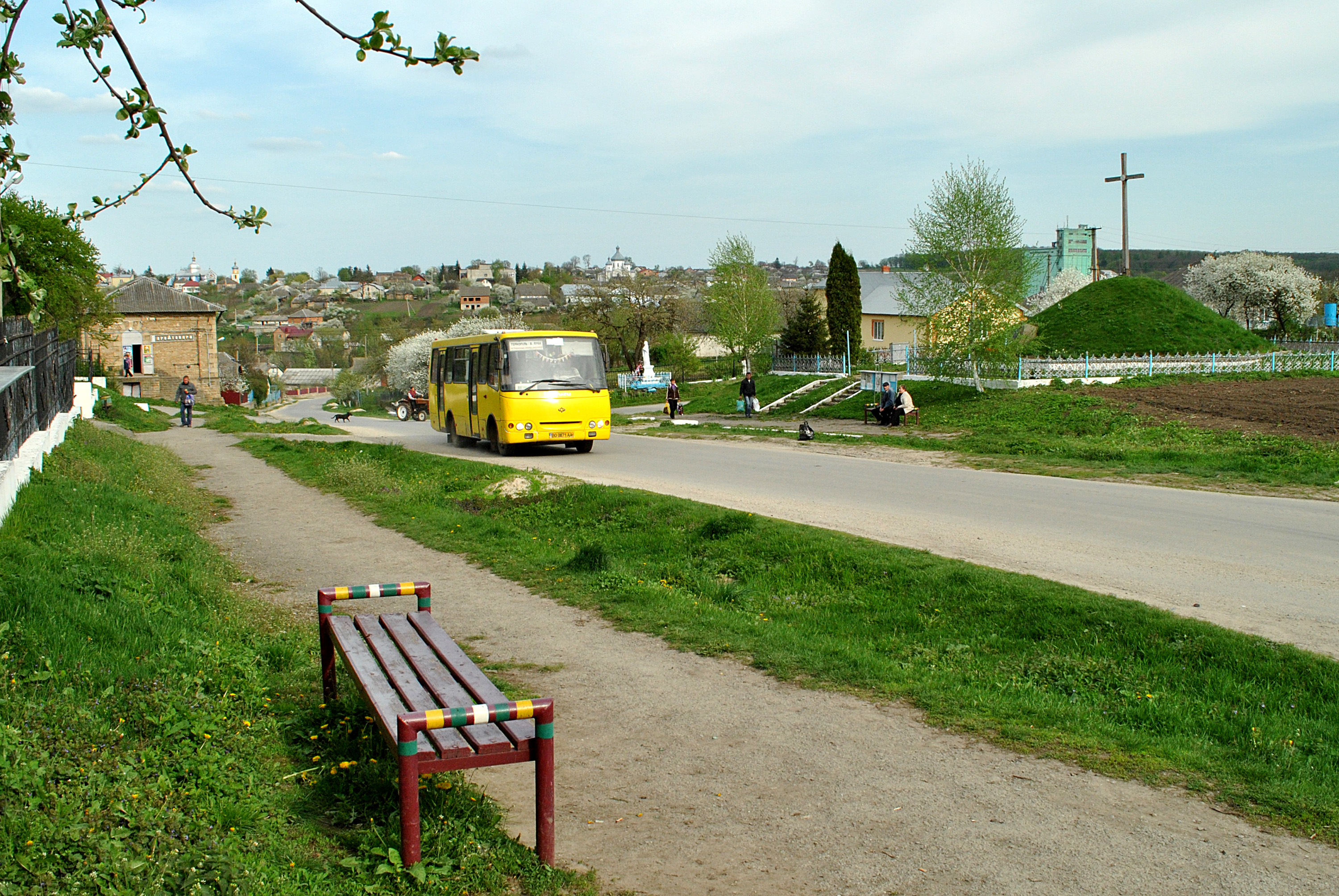 Рейсовий автобус «Тернопіль–Велика Лука» на центральній вулиці Великої Луки.